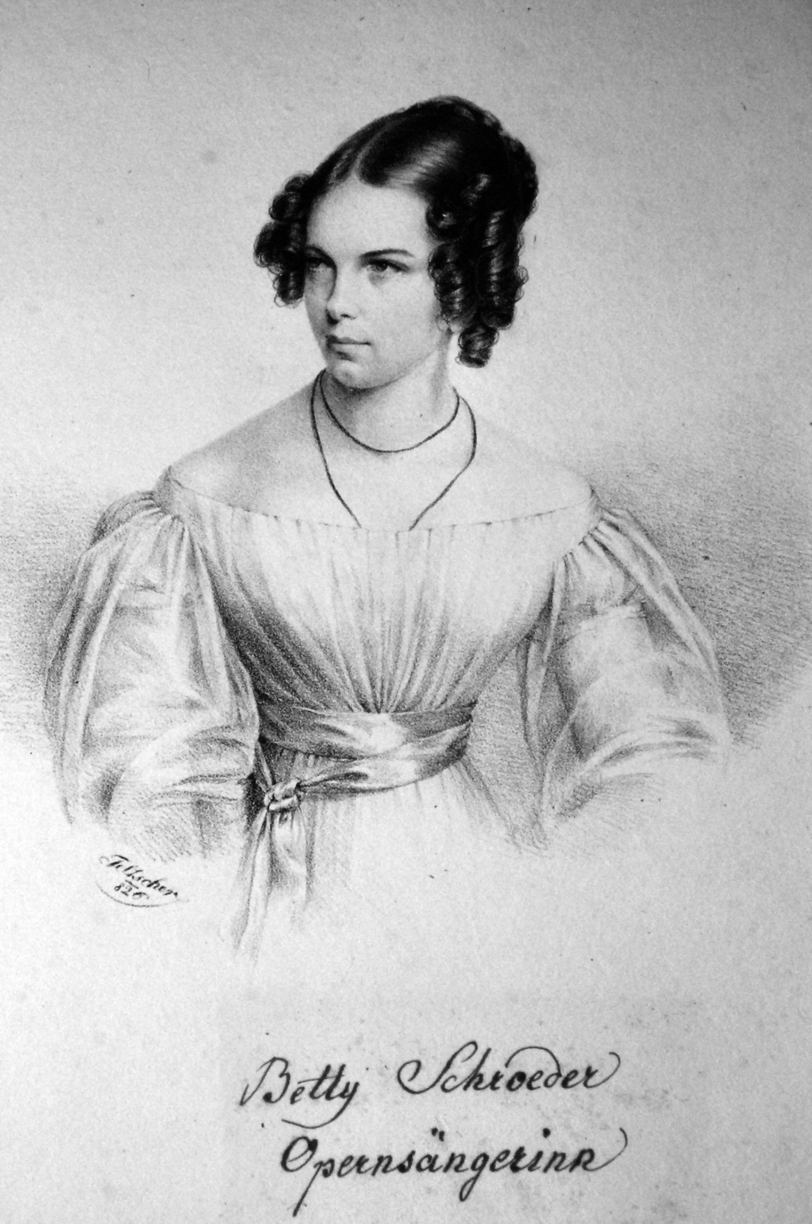 Betty Schroeder, verehelichteSchmidt (1806-1887), Tochter von Sophie Schroeder. Deutsche Sängerin und Schauspielerin. Lithographie von Josef Eduard Teltscher, 1826